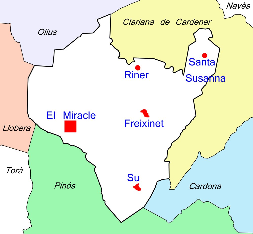 Mapa del municipi de Riner amb les seves entitats de població i els municipis limítrofes.